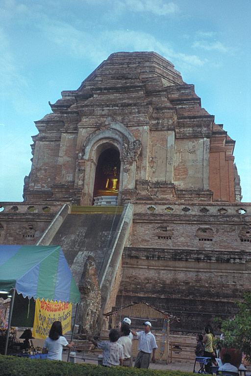 Wat Chedi Luang, Chiang Mai, June 1999